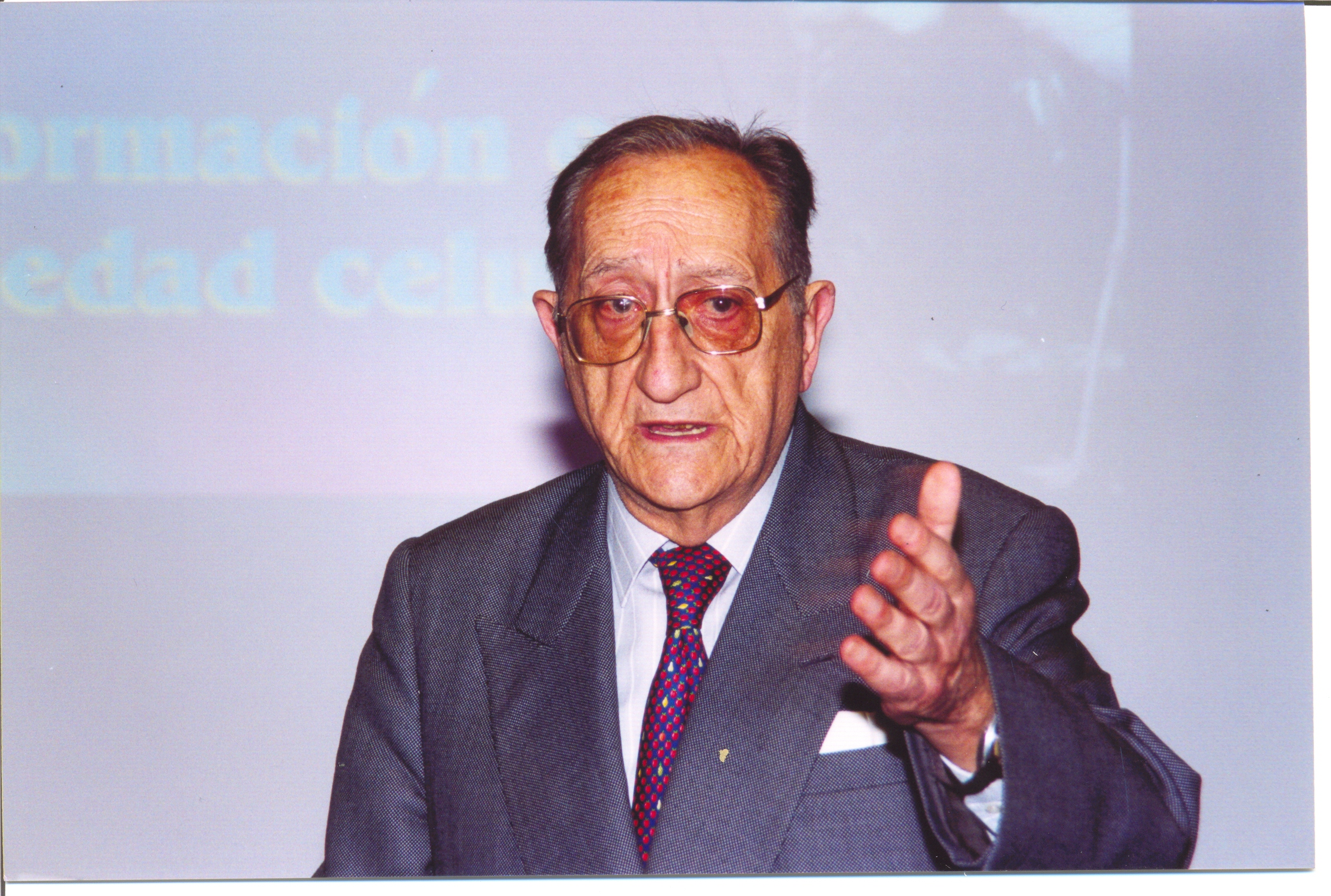 Mr. Martín Municio during its lecture "Information on cell society" at Casa de las Ciencias of Logroño 2